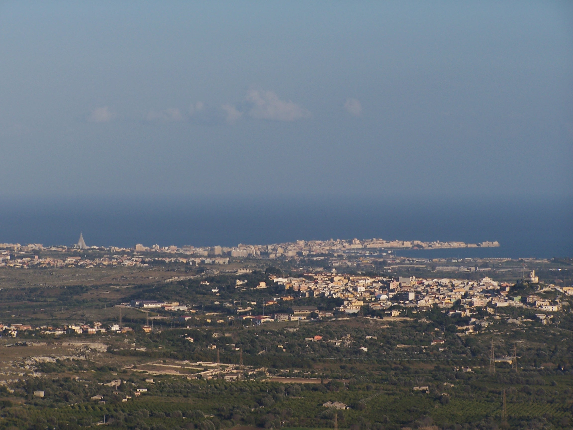 Siracusa, Belvedere e il porto visti dai monti Climiti